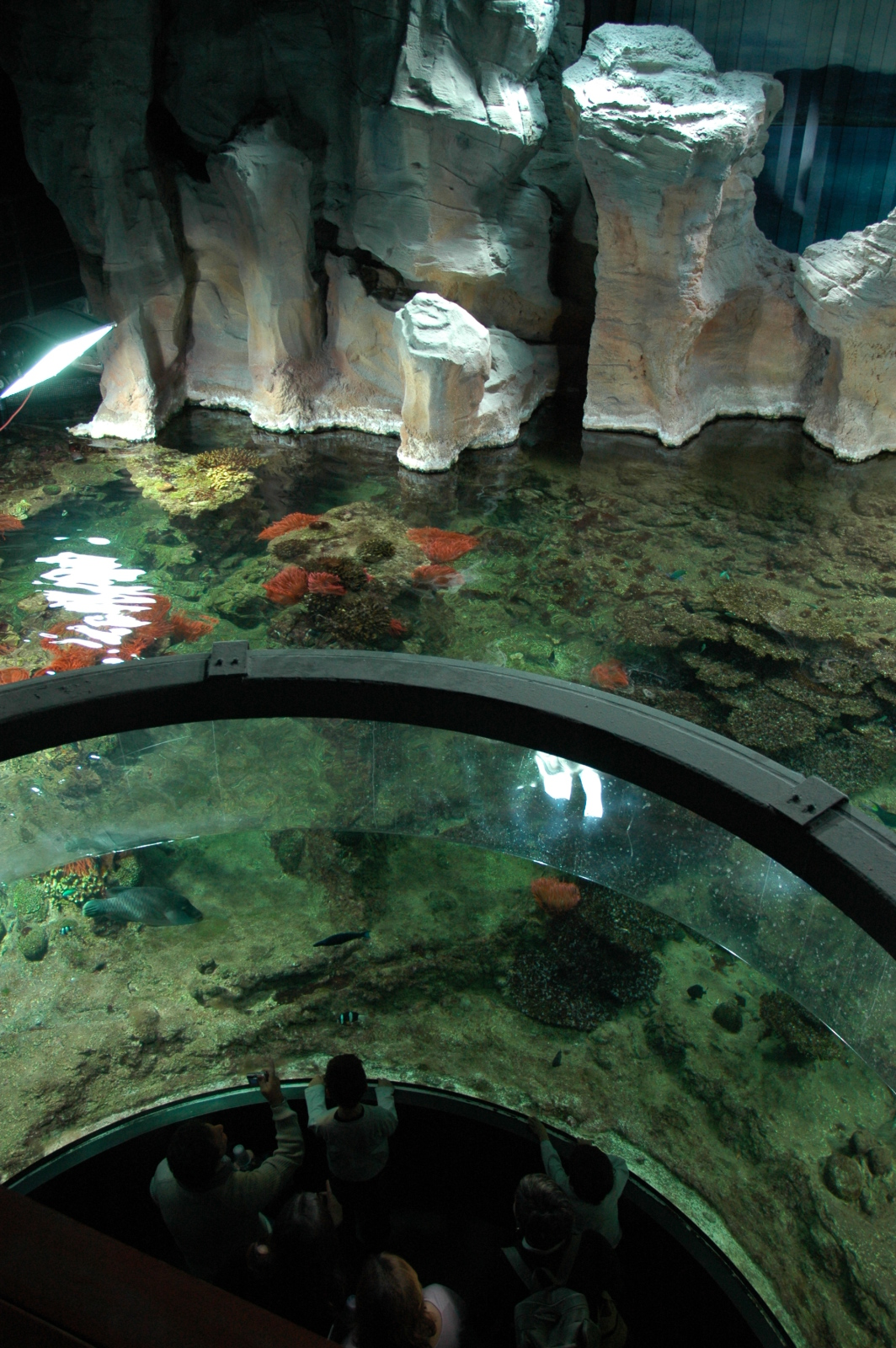 Interno dell'acquario di Genova